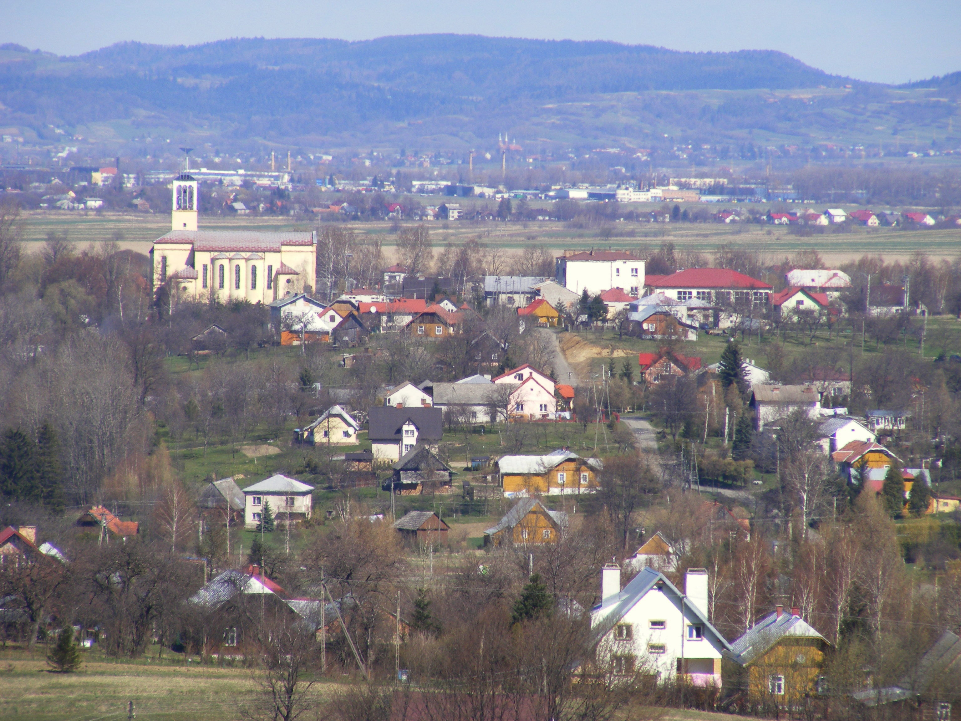 Wrocanka-Góra, ulica Długa i Krzywa